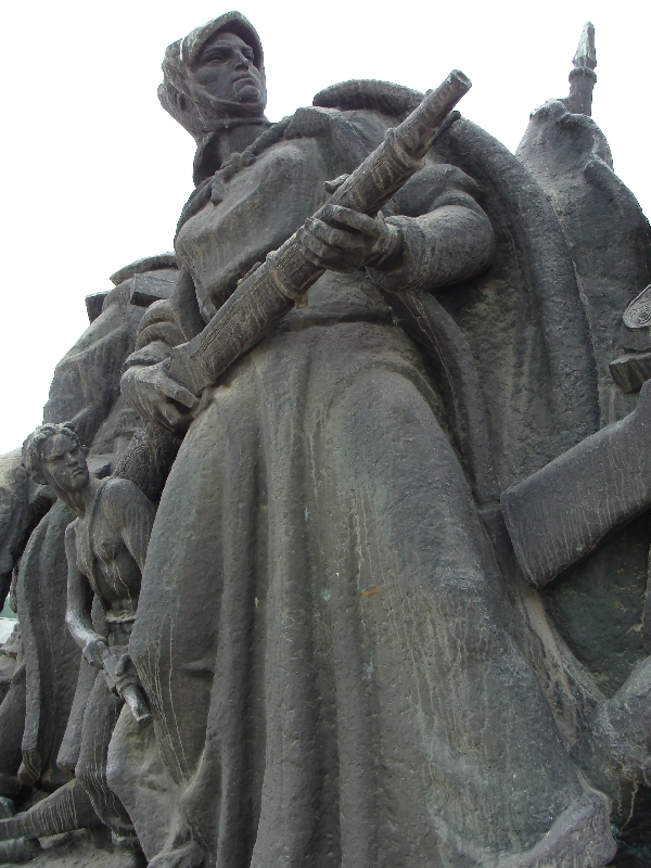 Partisan Monument, Skopje, Macedonia